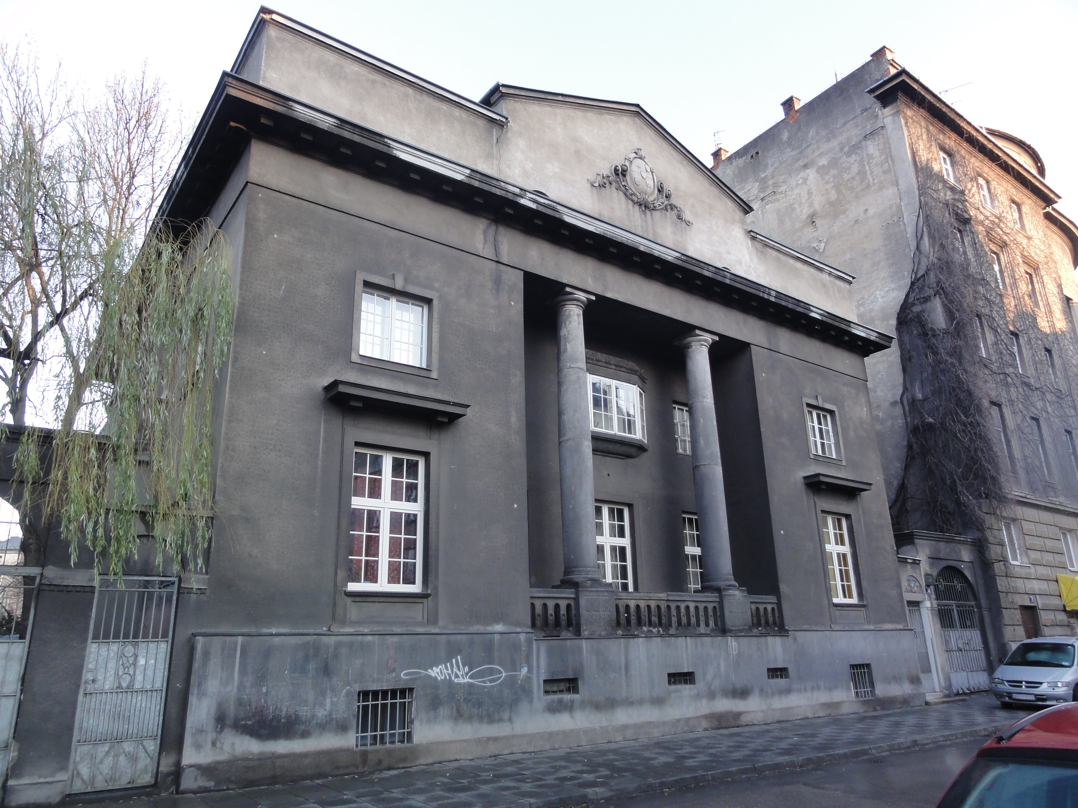 Dom Weissów w Krakowie, ul. Krupnicza 31